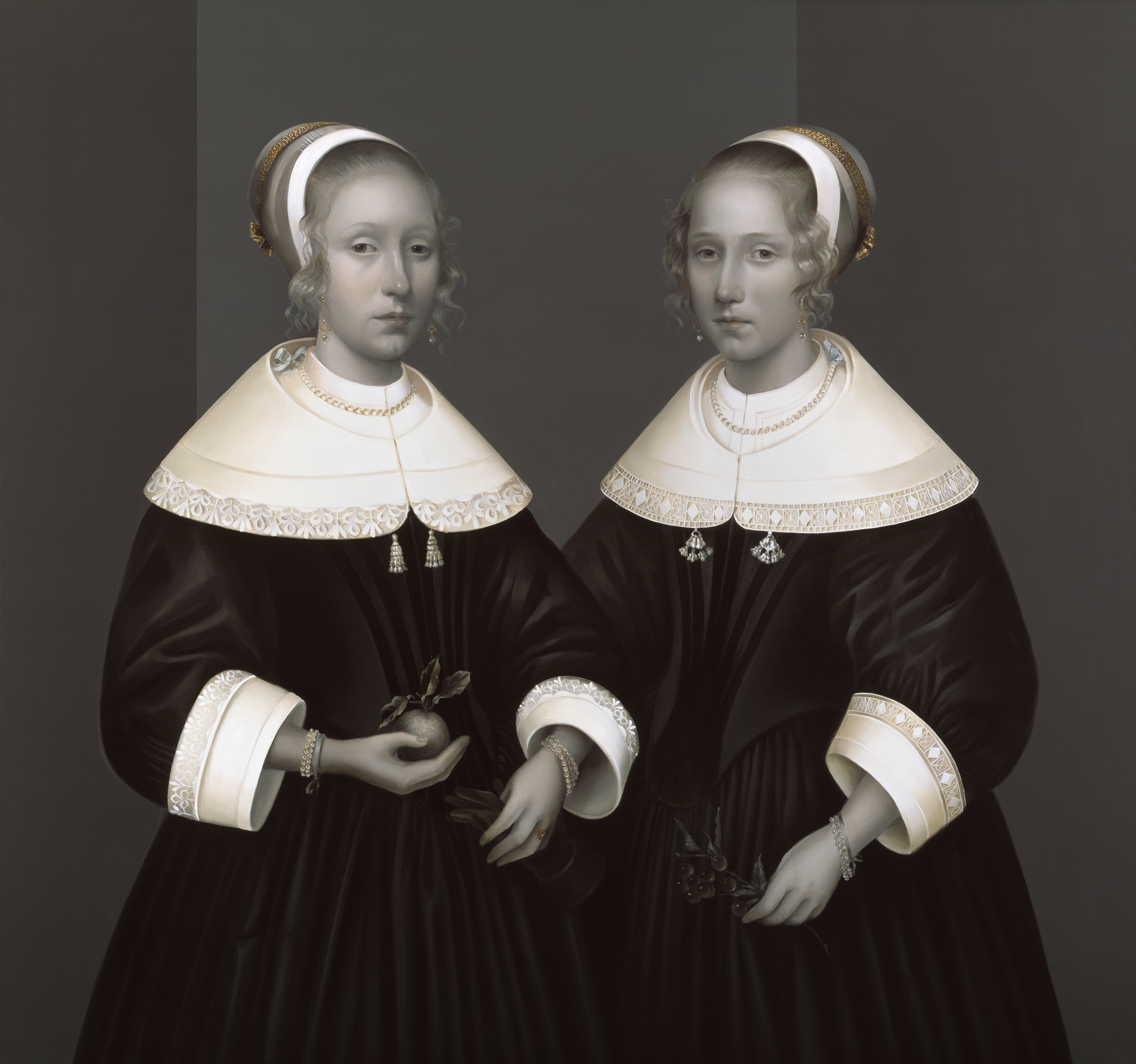 Mary A Waters, Dutch Sisters, 190x200cm, olieverf op linnen, 2014